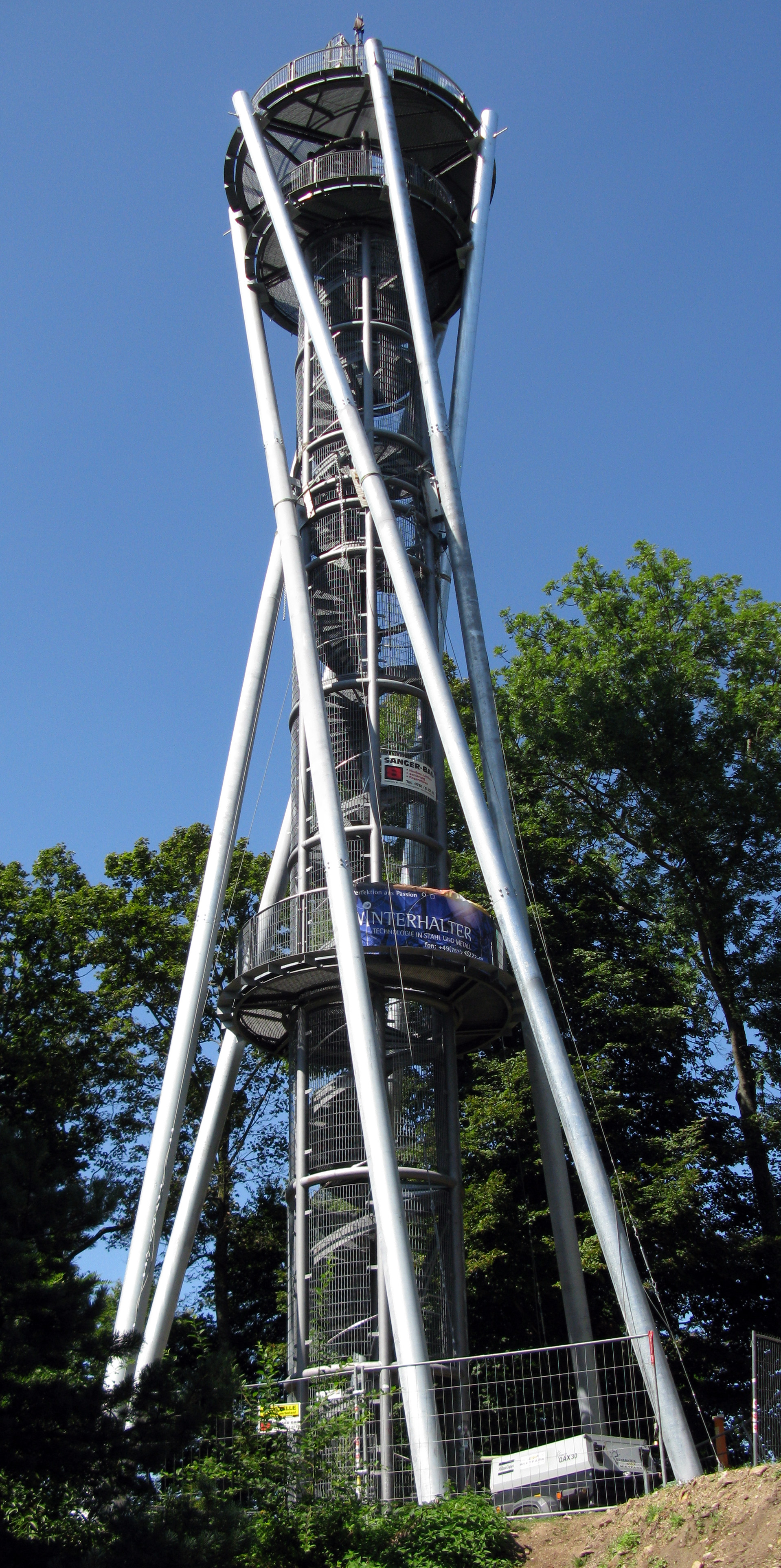 sanierter Schlossbergturm mit Stahlstützen in Freiburg